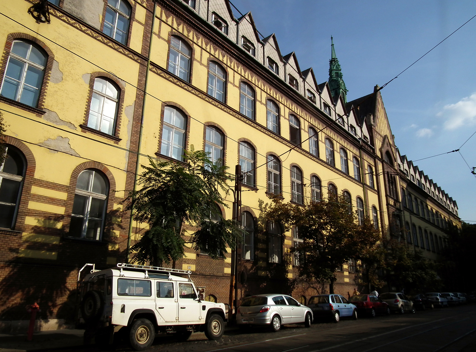 Budai Irgalmasrendi Kórház (Budapest 2, Frankel Leó utca 17-19.) This is a photo of a monument in Hungary. Identifier: 11766